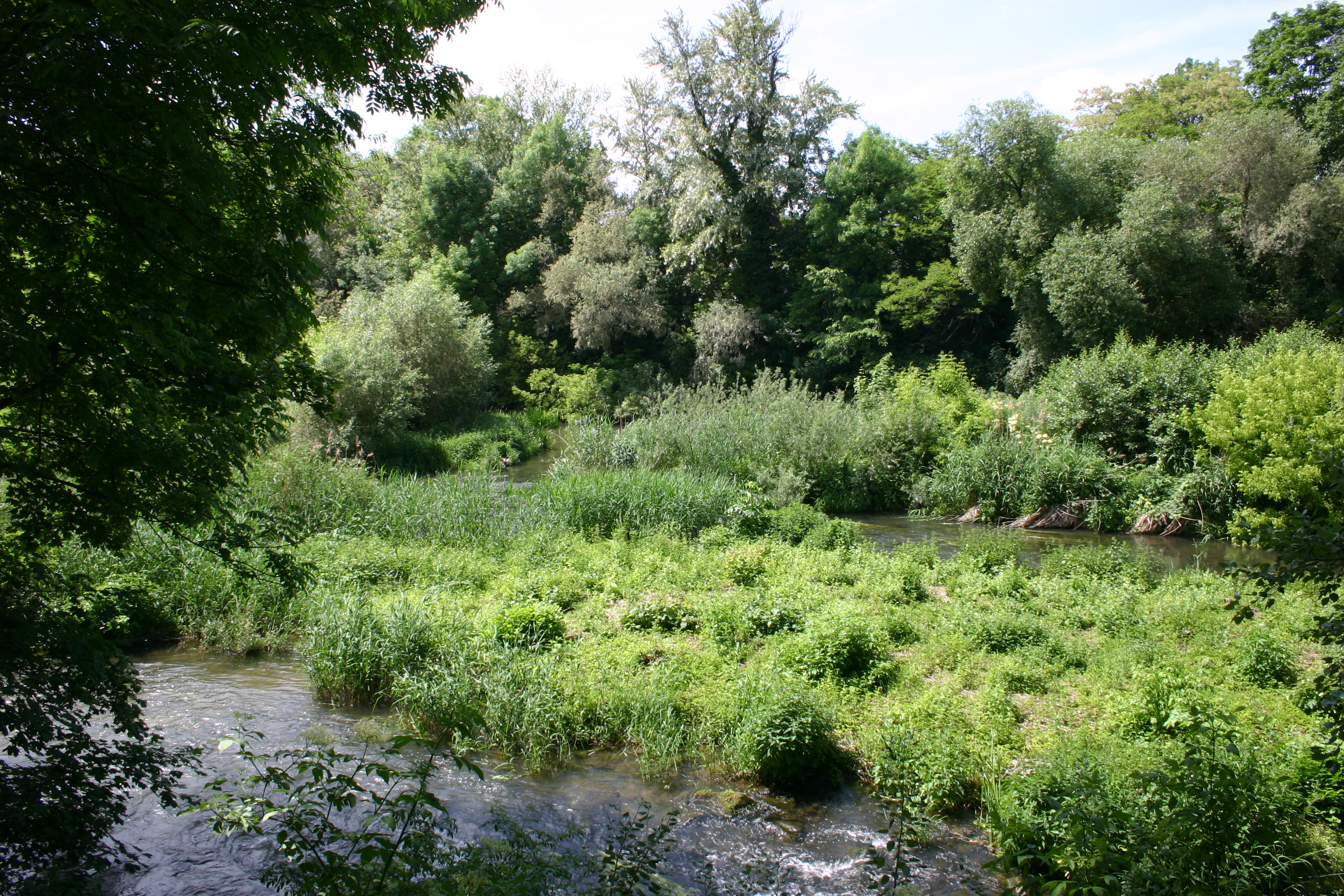 Der Seitenarm des Mains, auch als Saumain bekannt, ist ein Naturschutzgebiet von insgesamt 11,6 Hektar. Naturschutzgebiet „Saumain in der Stadt Schweinfurt“ (NSG 00458.01). Aufgenommen von einer Aussichtsplattform oberhalb des Saumains.